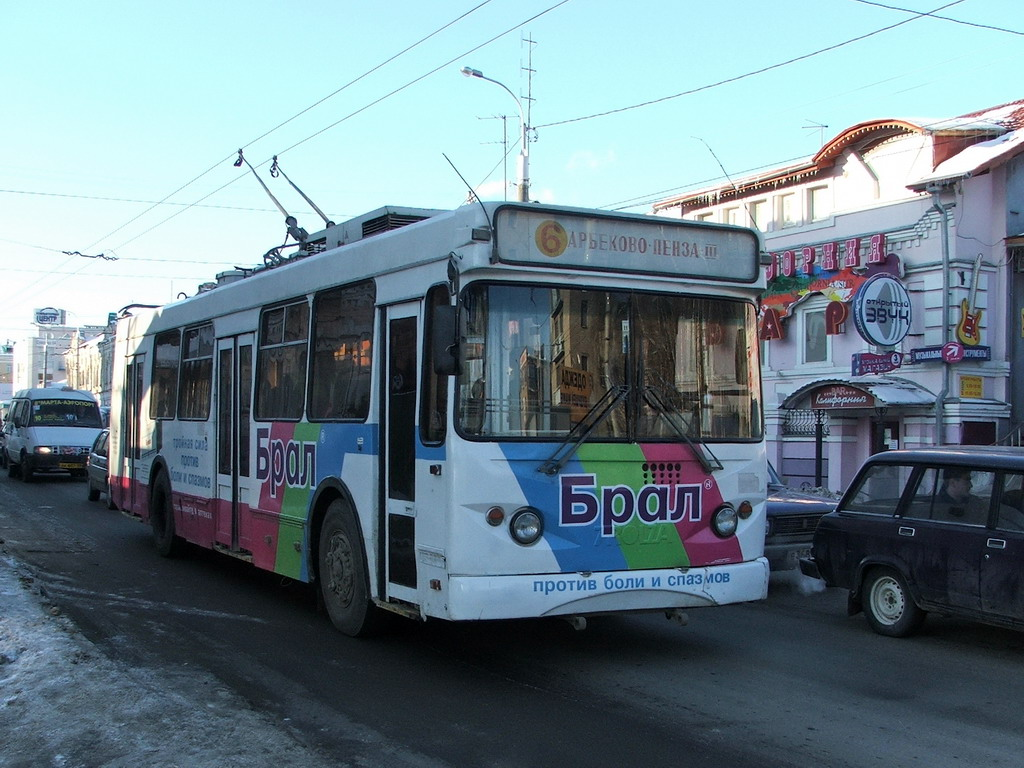 Троллейбус Тролза-5264.01 «Столица» 2000 года выпуска на улице Суворова в г. Пензе.